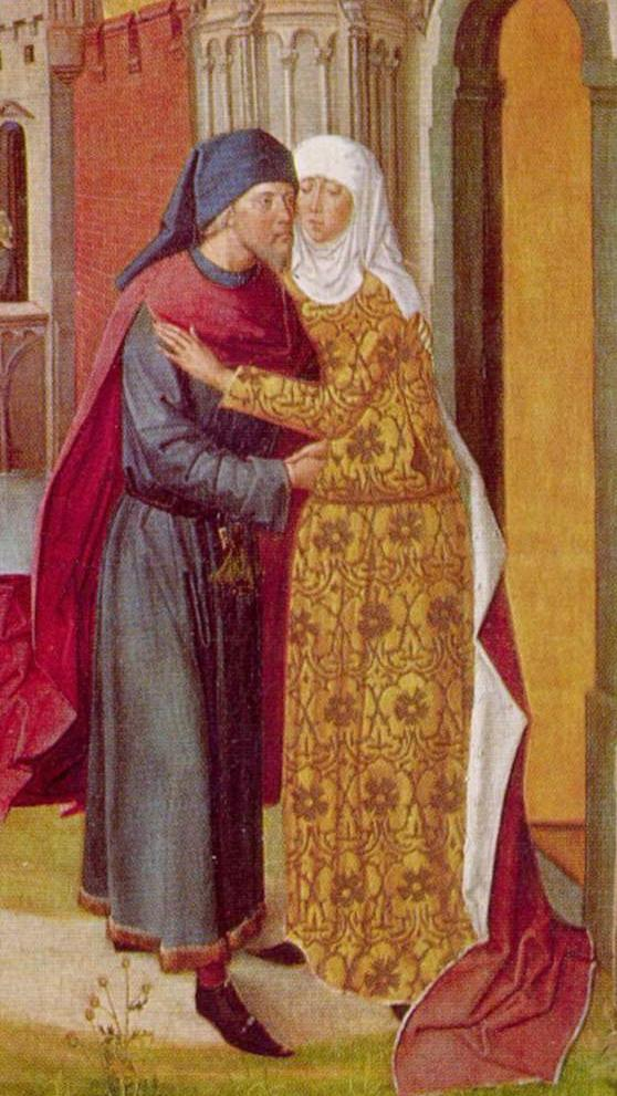 Fragment obrazu istniejącego na wiki (File:Meister_des_Marienlebens_004.jpg)